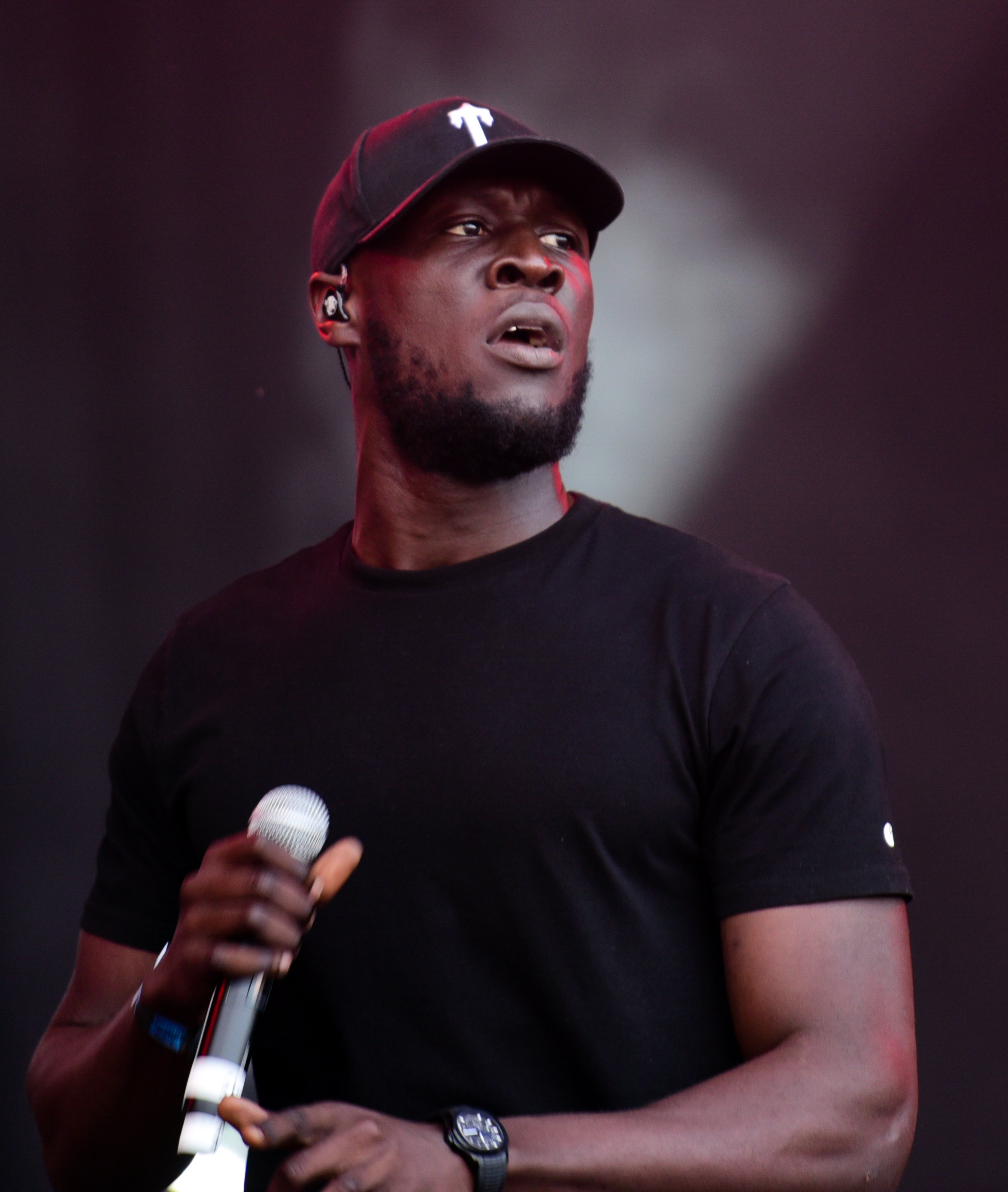 Stormzy live auf dem Openair Frauenfeld 2019